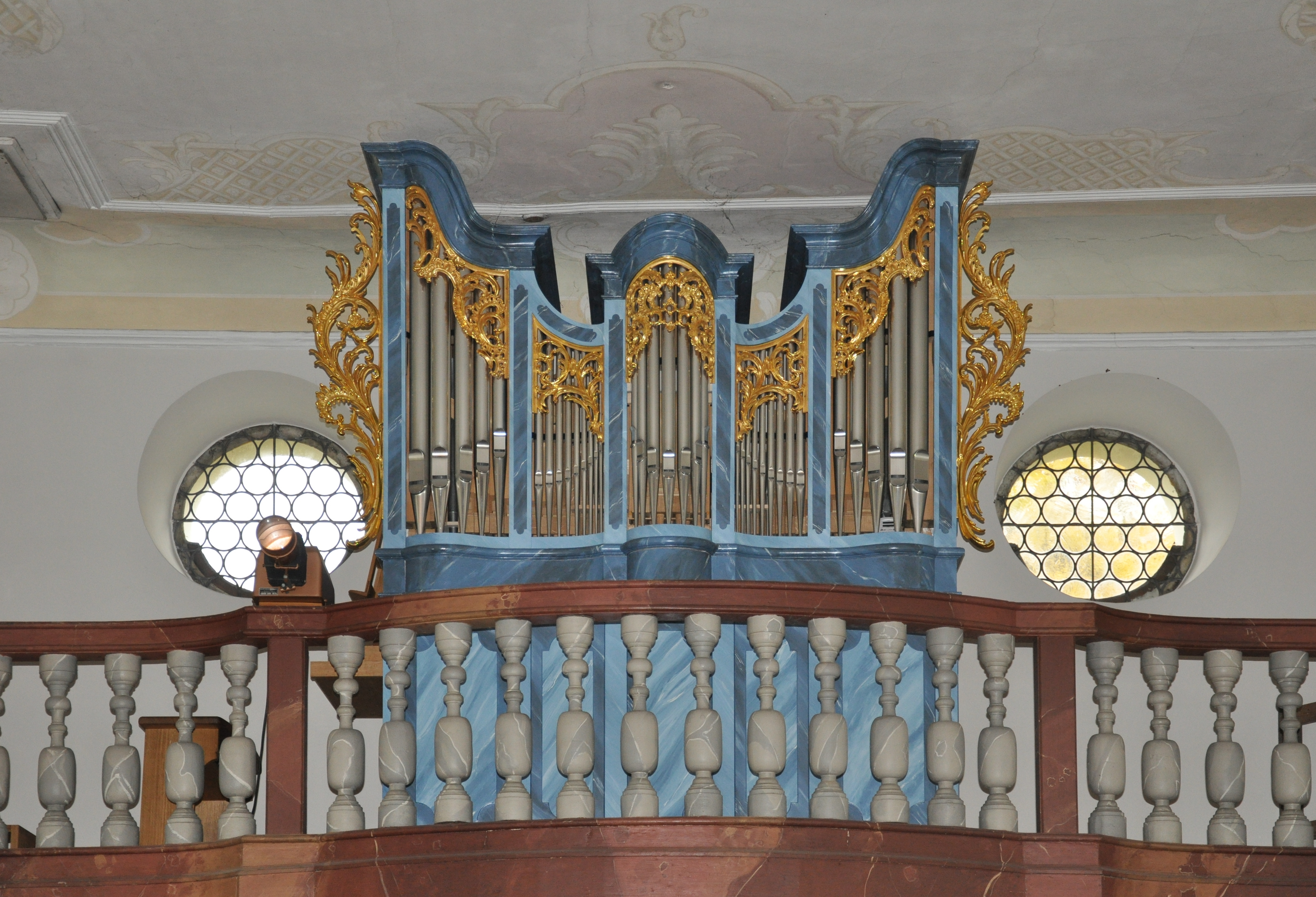 Ravensburg, Kirche Mariatal bei Weißenau (ehem. Klosterkirche des Frauenklosters Mariatal); Orgel von Orgelbau Wolfgang Stützle, Waldkirch, 2009